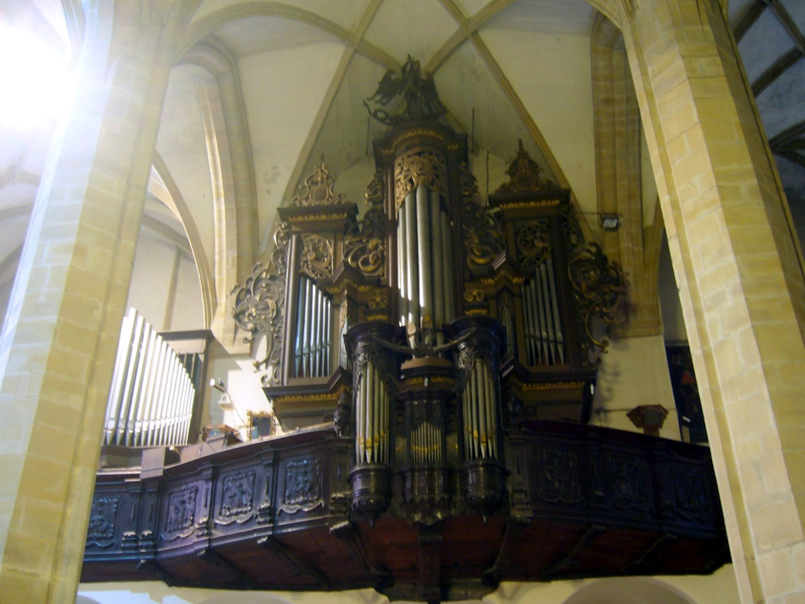 Veľký organ v Konkatedrále sv. Mikuláša v Prešove